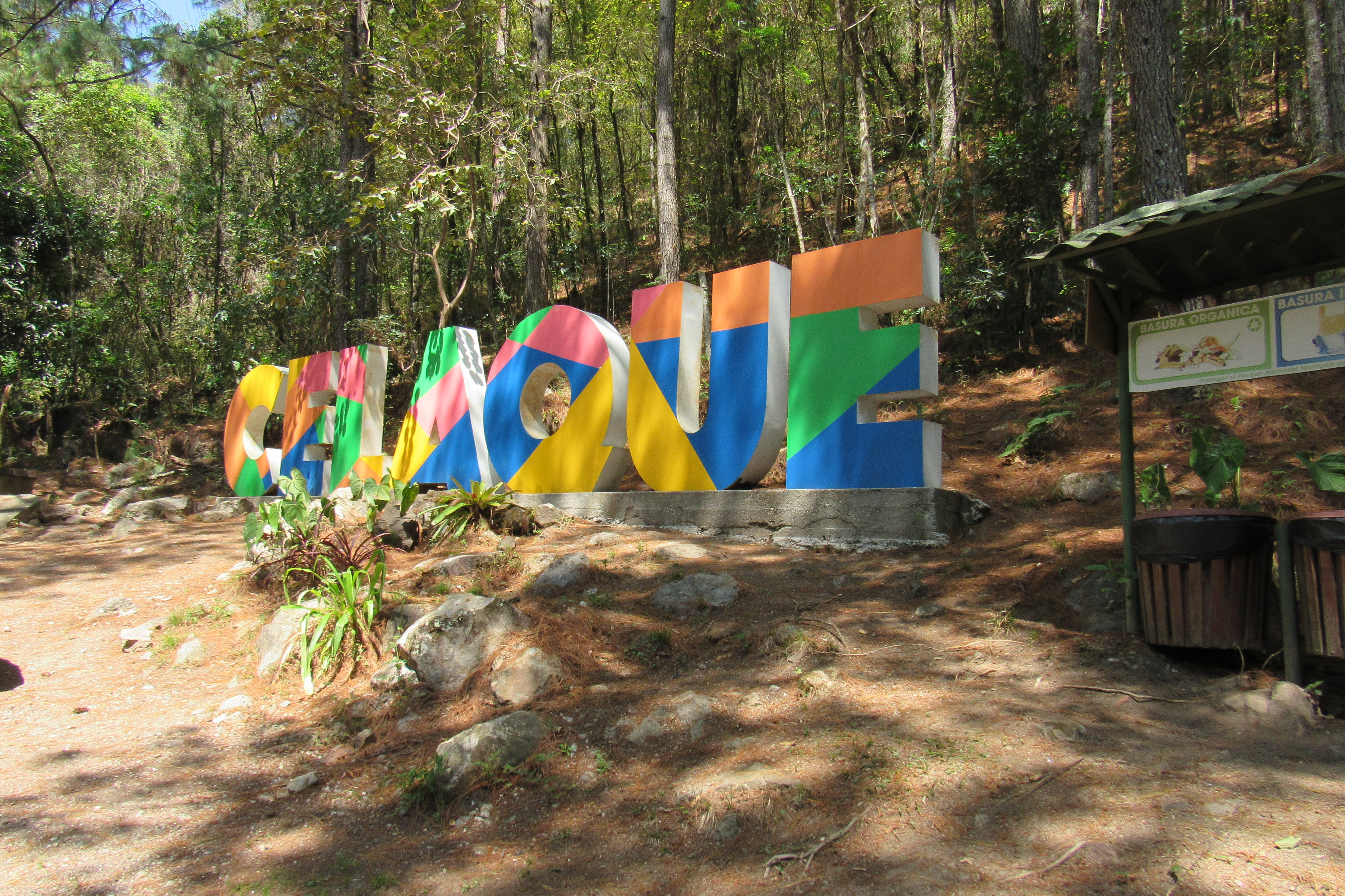 Esta es la bienvenida al parque donde se dejan los vehículos y pueden empezar a subir la montaña.